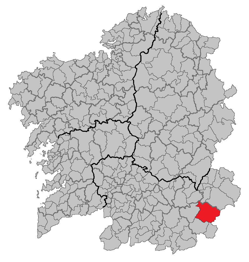 Mapa coa localización do concello de Viana do Bolo.